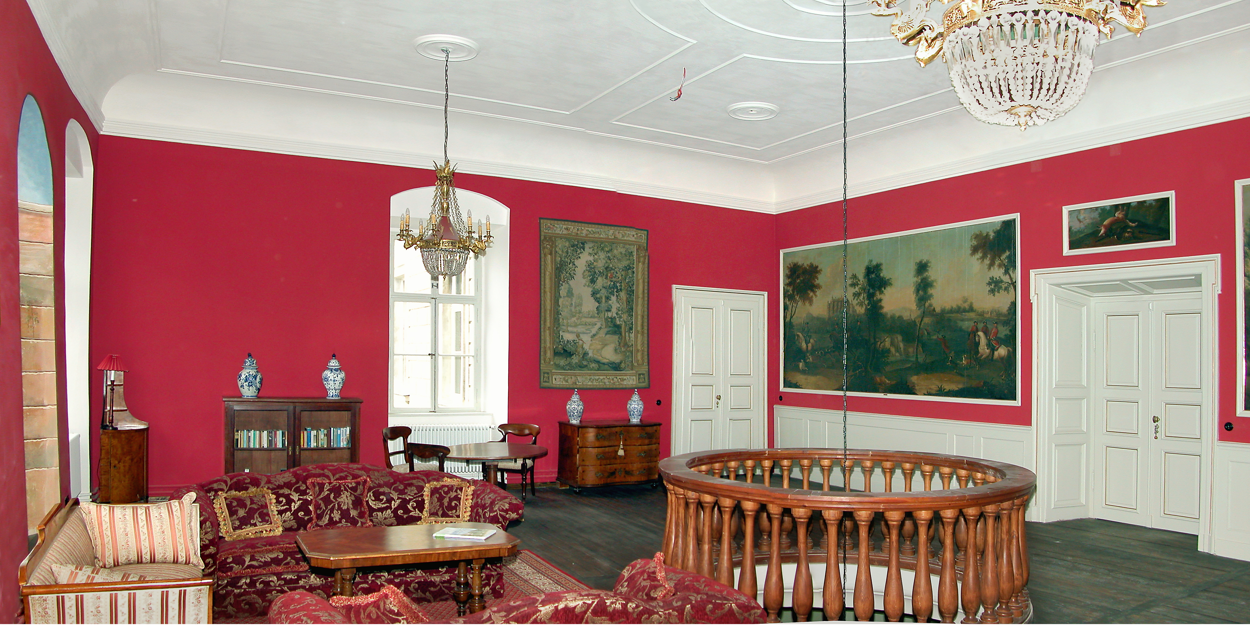 16.03.2008 02633 Gaußig: Schloß. Oberes Vestibül. [DSCN31959-31960.TIF]20080316555MDR.JPG(c)Blobelt